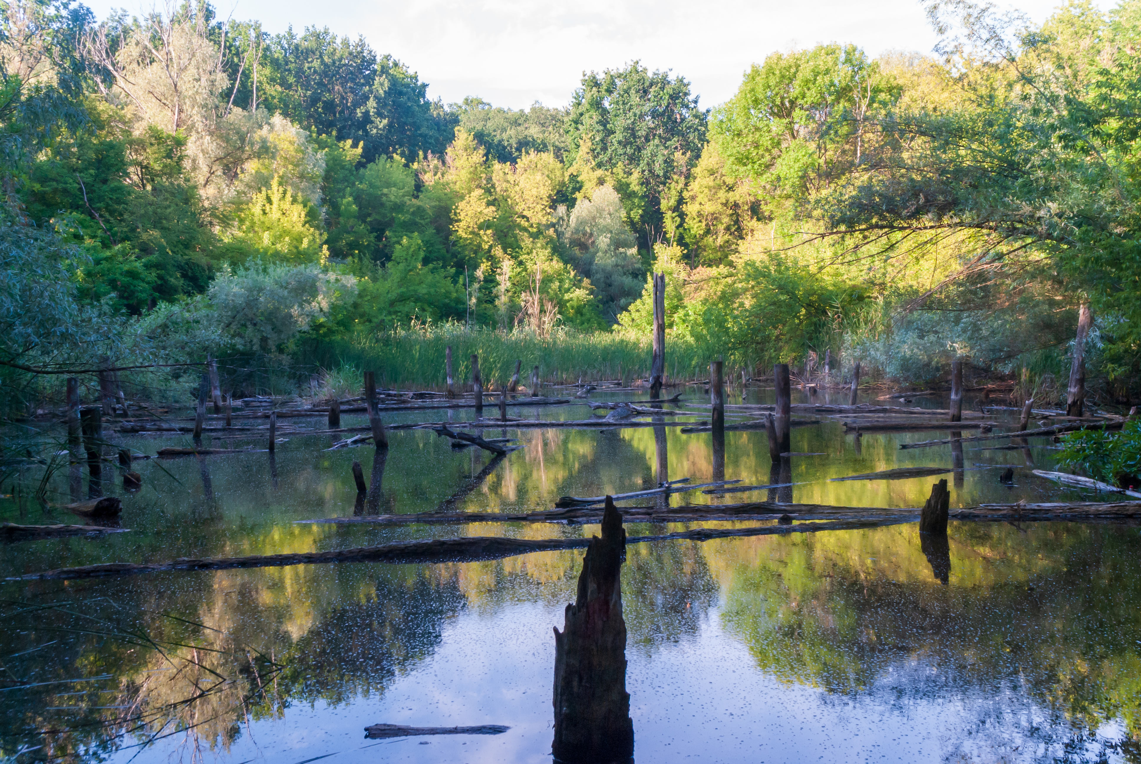 Ділянка дубових насаджень, м. Дніпропетровськ, у північній частині с. Таромське Ленінського району, Ленінське лісництво кв. 33, діл. 6